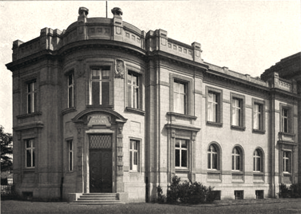 Hetjens-Museum, Straßenansicht, Hofgartenufer 3, Foto von 1908